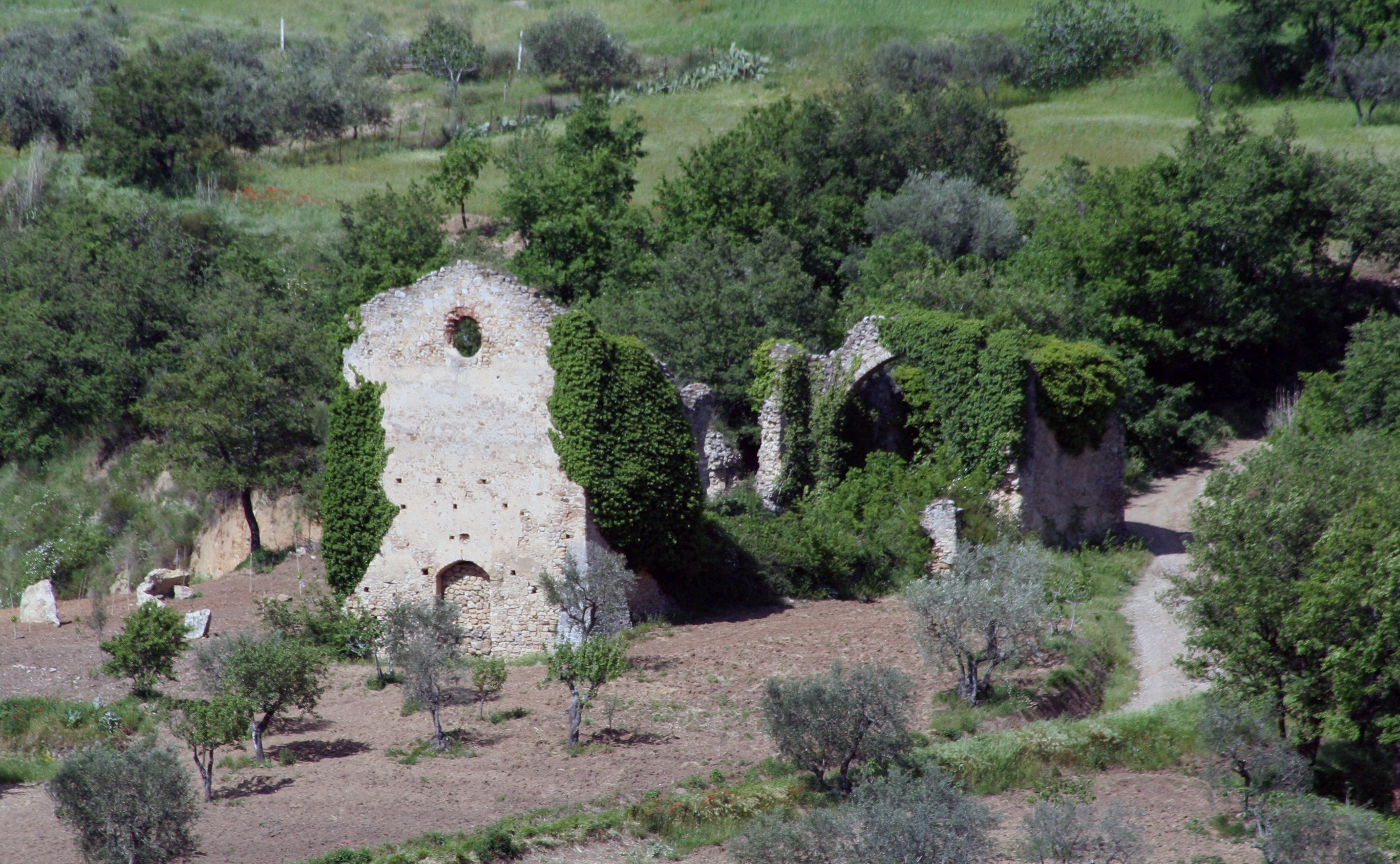 Autore: Rocco Stasi, fatta da me. Ruderi dell'antica chiesa della TrinitÃ . Nel '500 furono ivi ritrovate le reliquie, ritenute miracolose, di S. Potito martire, oggi custodite in Cattedrale. GFDL